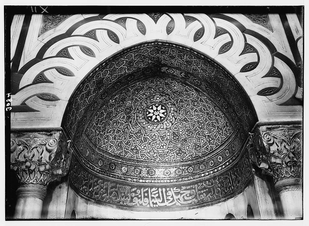 פסיפס במערת המכפלה Machpelah. Mosaics in prayer niche. Close up of details